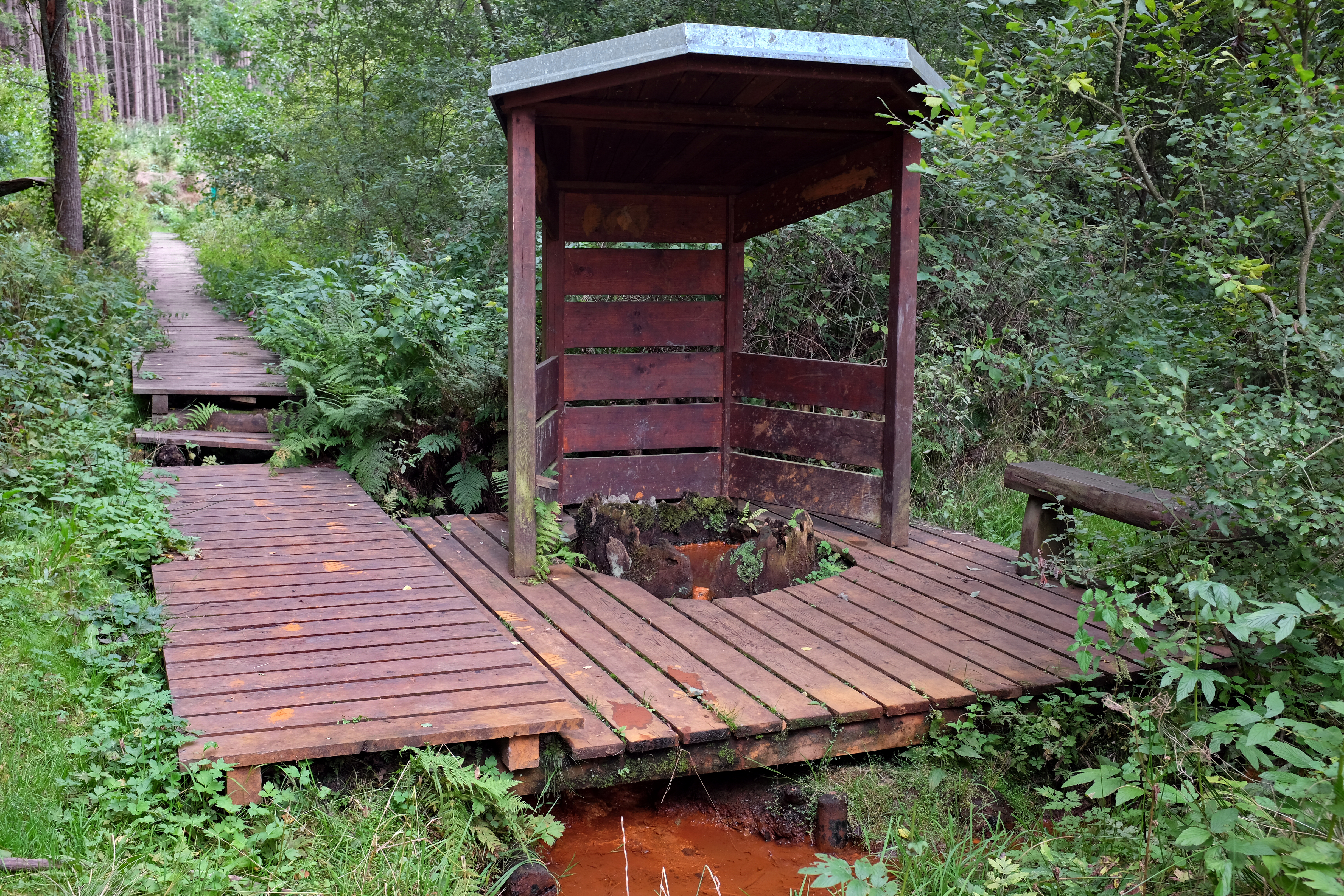 Panská kyselka, při Panském potoce u obce Drmoul, okres Sokolov